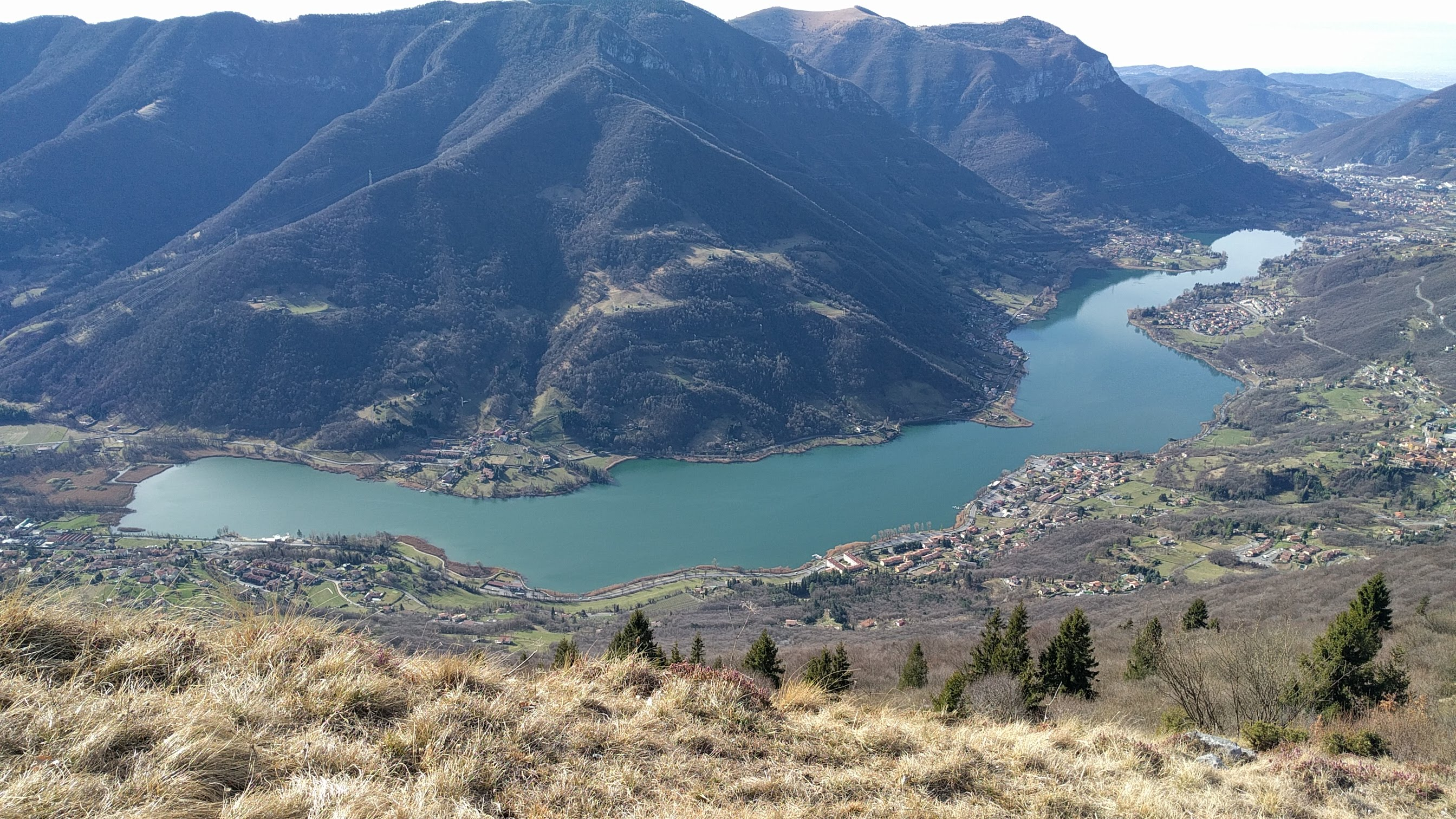 Lago di Endine visto dal Monte Sparavera